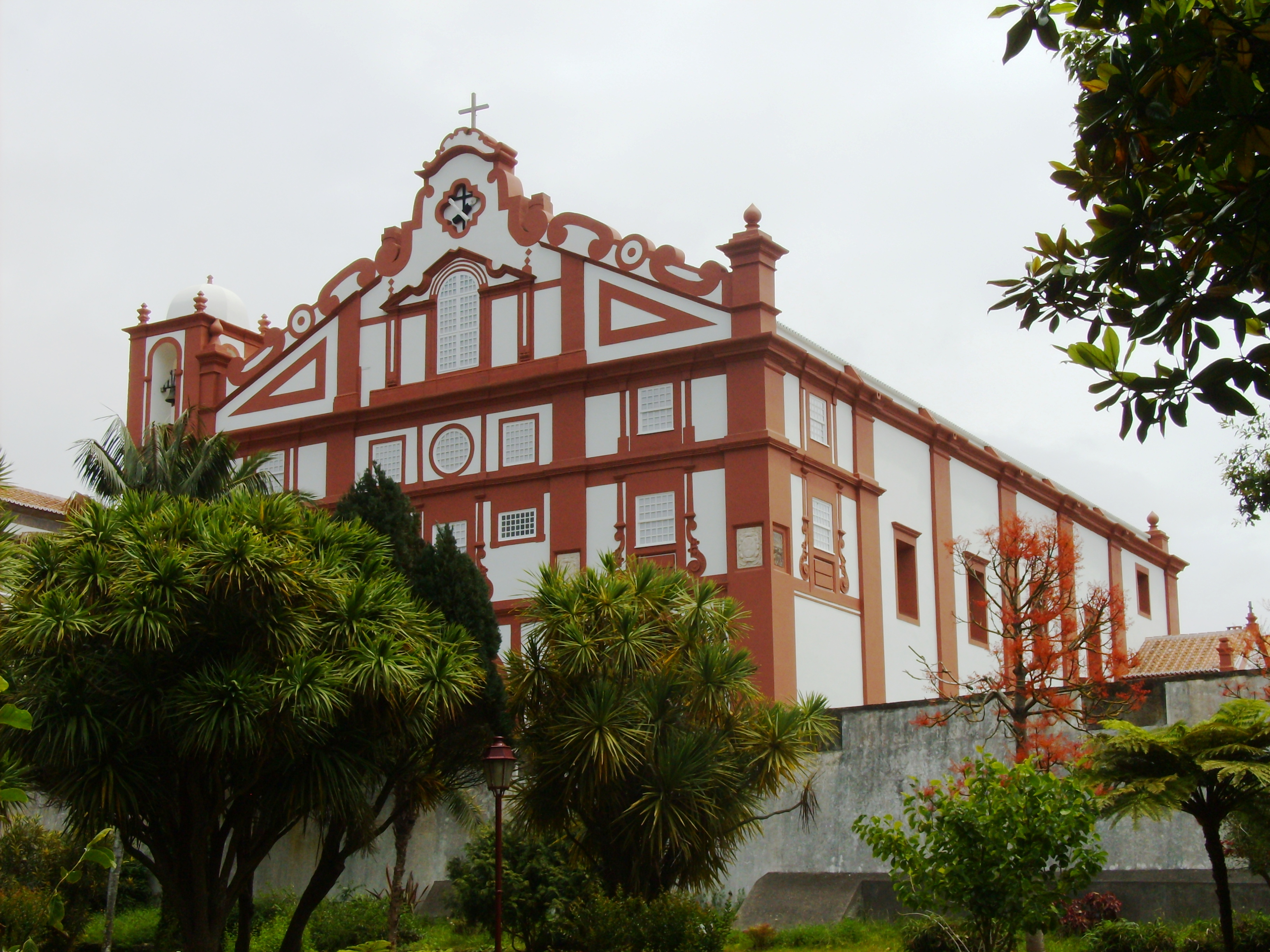 Igreja do antigo Convento de São Francisco (hoje Museu de Angra do Heroísmo), Angra do Heroísmo, ilha Terceira, Açores.